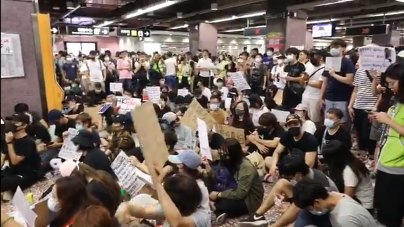 9月6日有香港市民在港铁太子站大堂静坐，要求港铁交出831示威者被打伤事件的监控录像